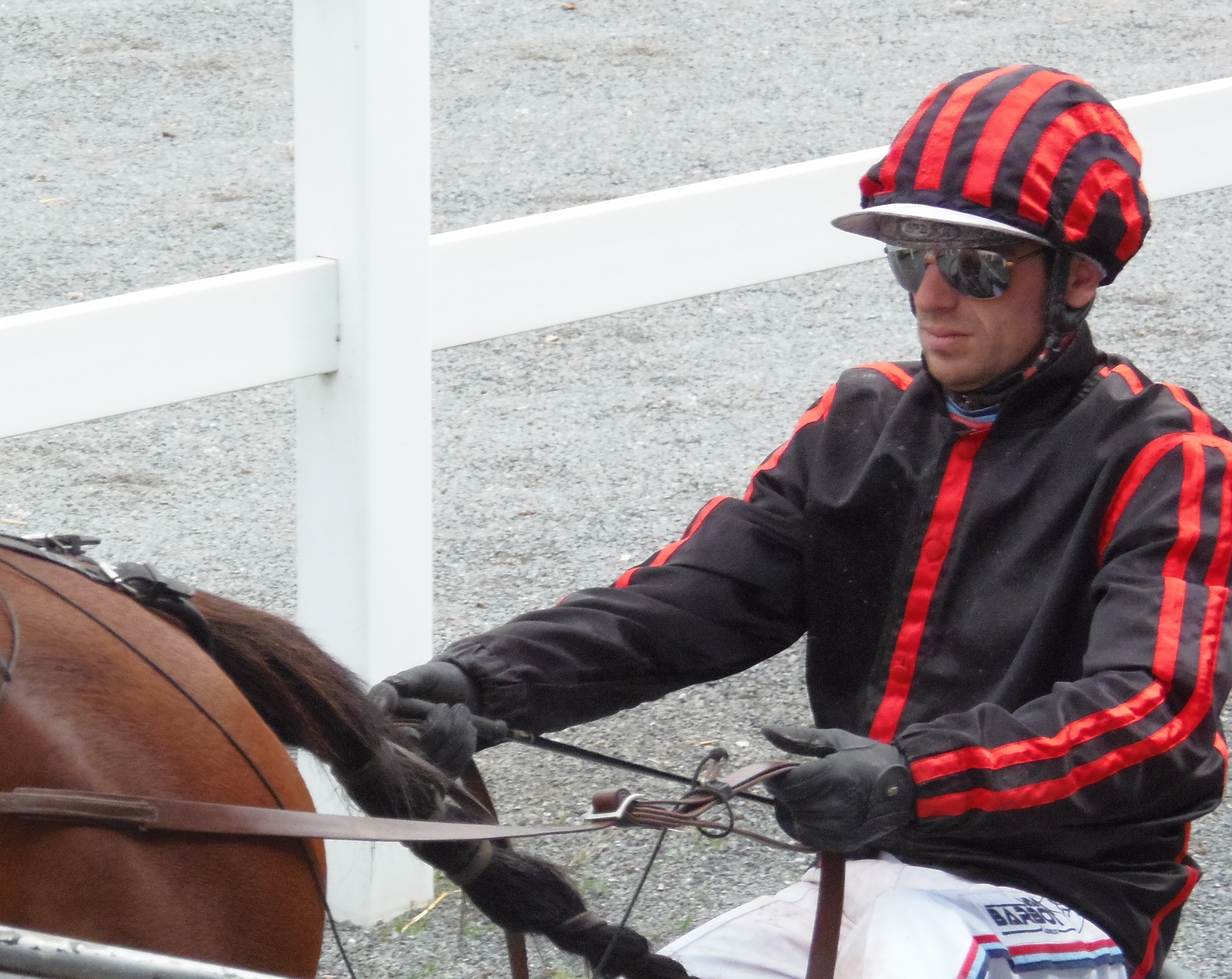 Le jockey et driver Yoann Lebourgeois, entrant sur l'hippodrome Robert-Auvray de Vire (Normandie, France), au sulky de Diablo de Forgan, le 24 septembre 2016.